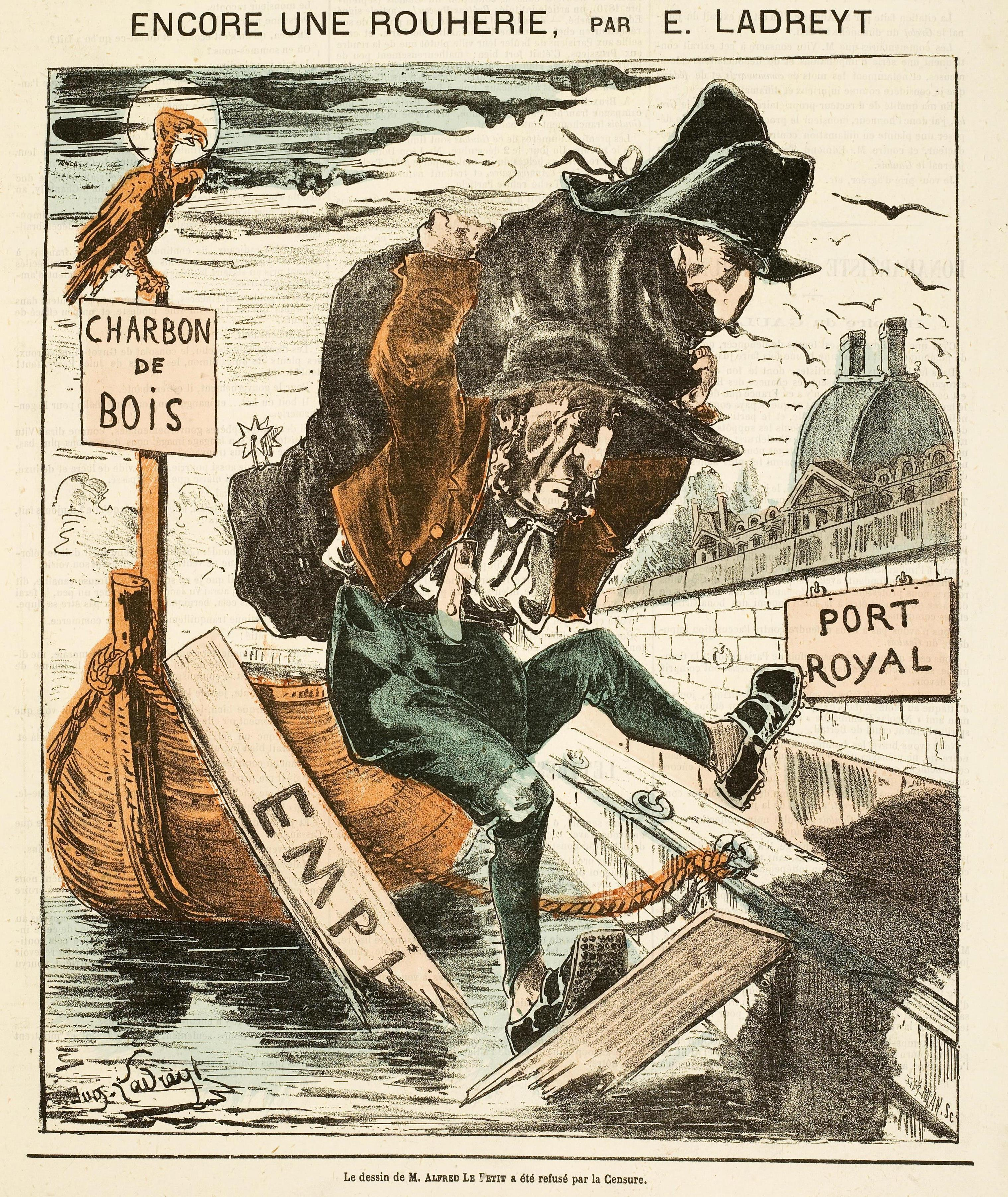 "Encore une Rouherie, par E. Ladreyt".